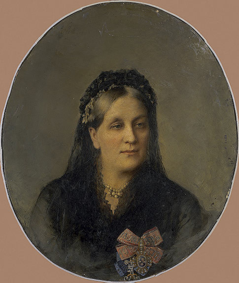 Княгиня Мария Александровна Долгорукова, ур. графиня Апраксина (1816—1892), жена С. А. Долгорукова.